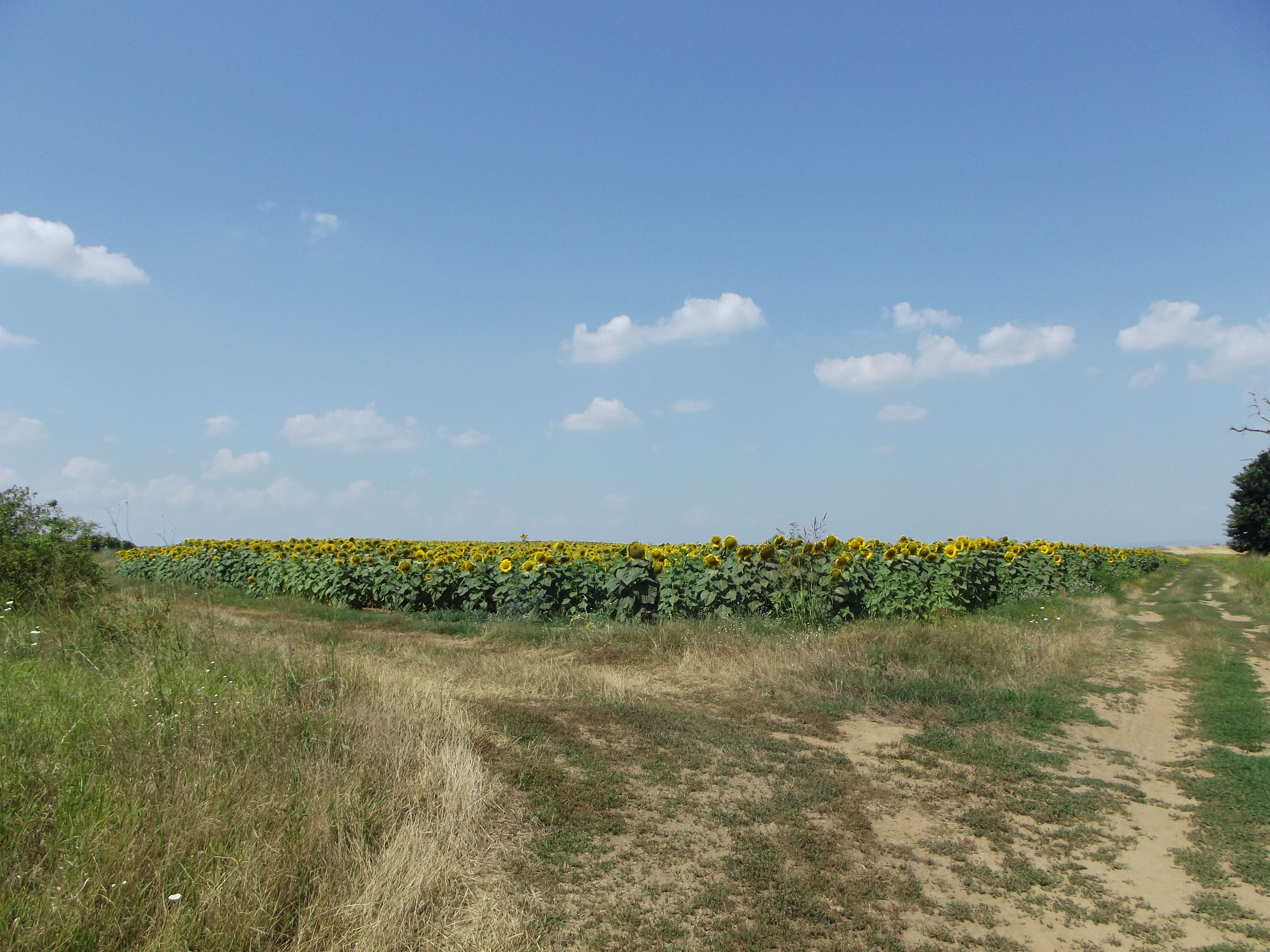 Местност Брестове, Ново село, Видинско